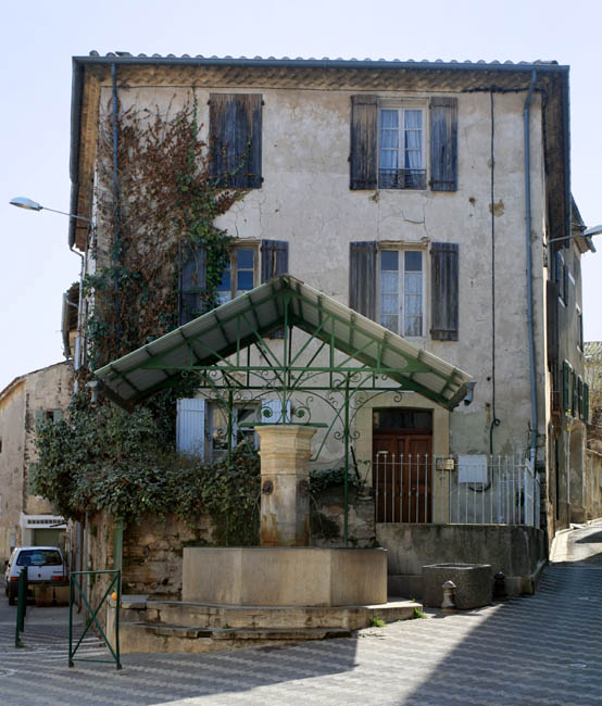 Malemort-du-Comtat in Vaucluse, France